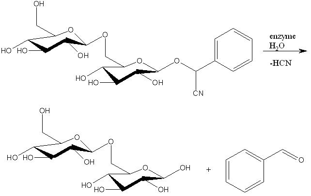 схема ферментативного гидролиза амигдалина